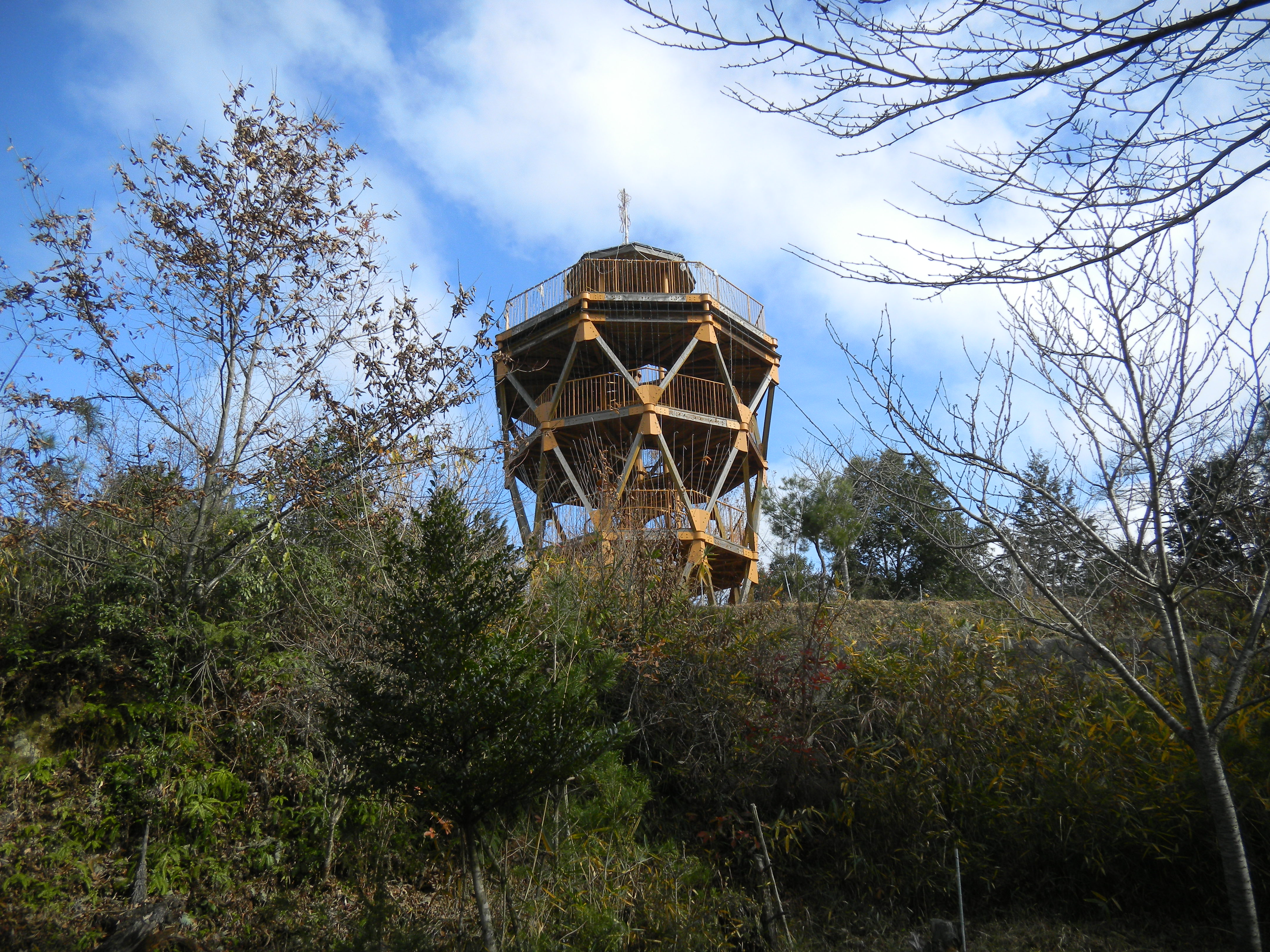 安芸高田市 向原 丸山公園